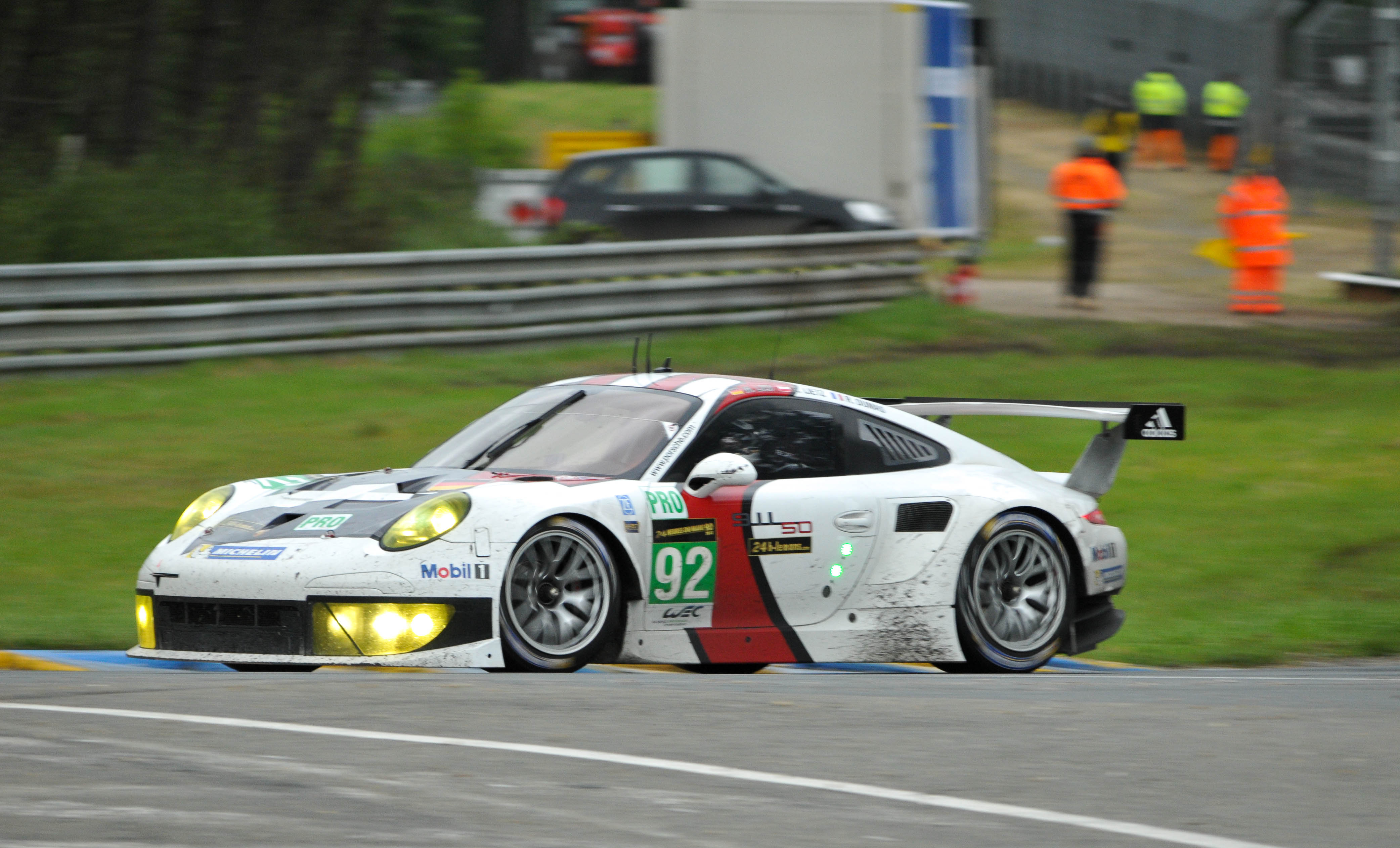 Le Mans 2013